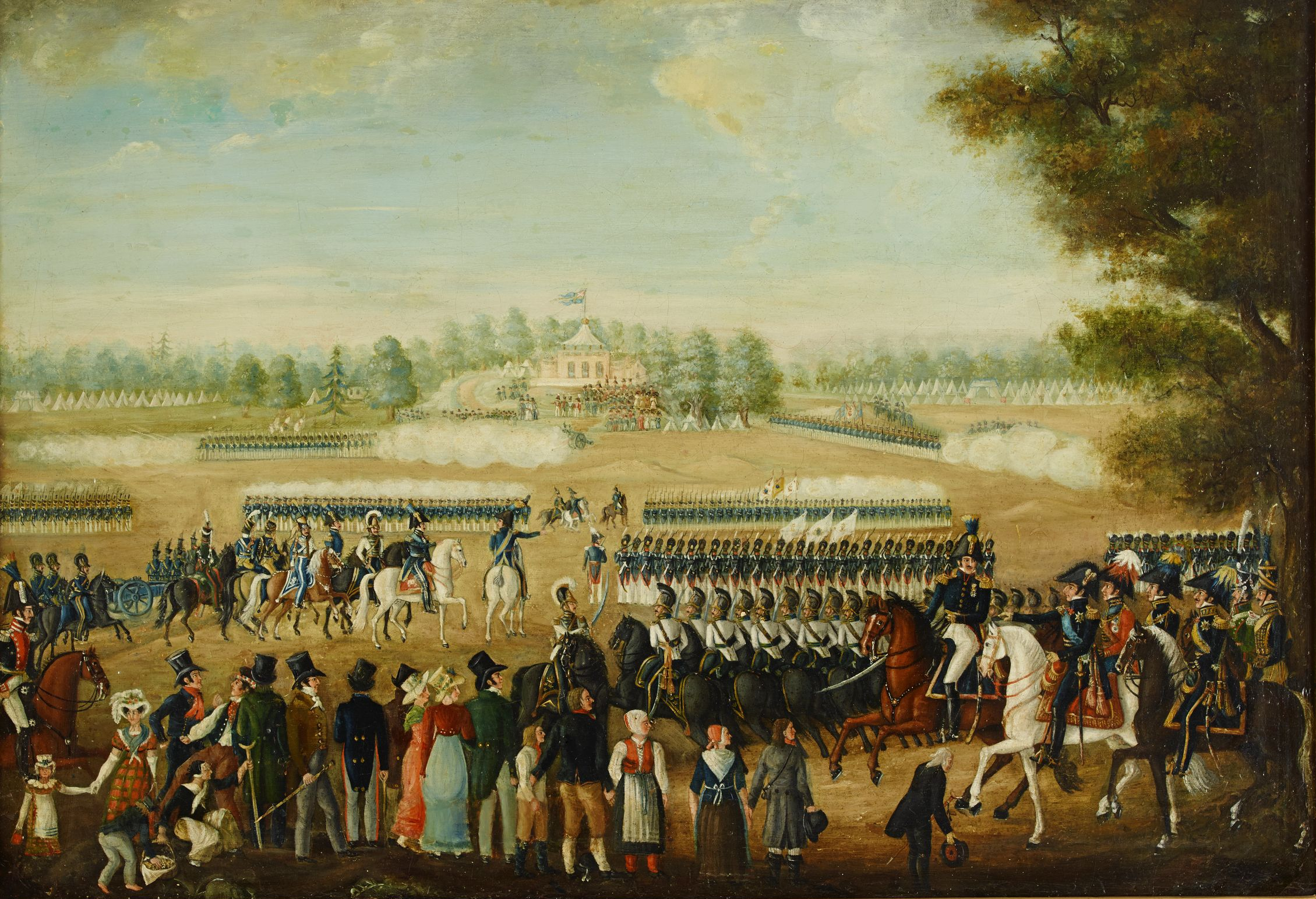 Exercisövning vid Ladugårdsgärde, under inspektion av Karl XIV Johan Olja på duk, 71 x 103 cm. Utförd troligen på 1830-talet av Anders Lundqvist (1803-1853) I fonden syns den kungliga paviljongen Borgen uppförd 1818 för Karl XIV Johan på en utlöpare av Drottningberget - en triumfpaviljong åt nationens segrande hjälte och monark. Den ritades av kungens favoritarkitekt Fredrik Blom. Paviljongen kröns av ett tält, med unionsflaggan fladdrande för vinden. I medföljande lapp finns texten: "Övningen inspekteras av Carl XIV Johan, jämnte hans förtrogne Magnus Brahe samt Georg Adlersporre, Carl Johan Adlercreutz och Carl Henrik Ankarsvärd m.fl. vid den stora Riks[.?.] vid Axwalla hed den 26 aug 1812."